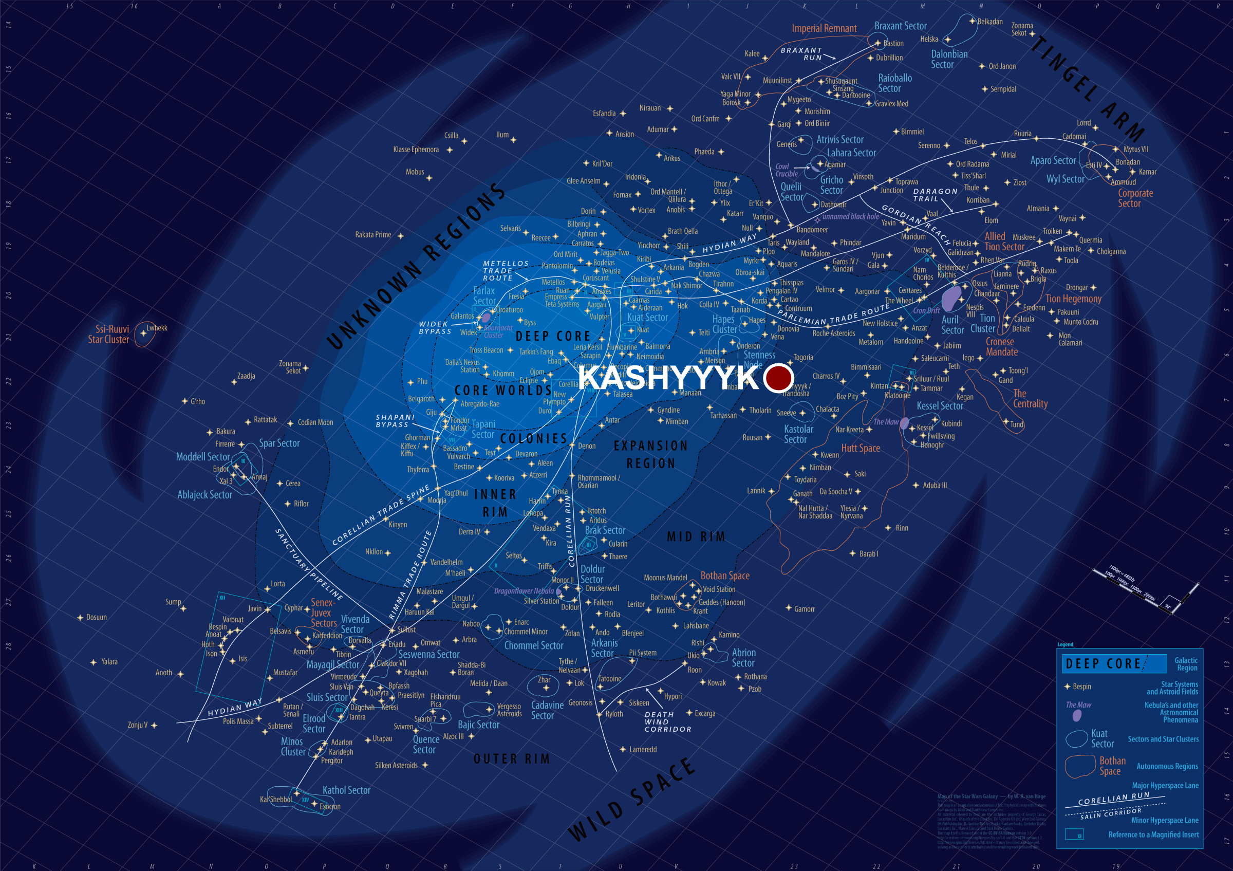 Localisation de Kashyyyk sur la carte Star Wars